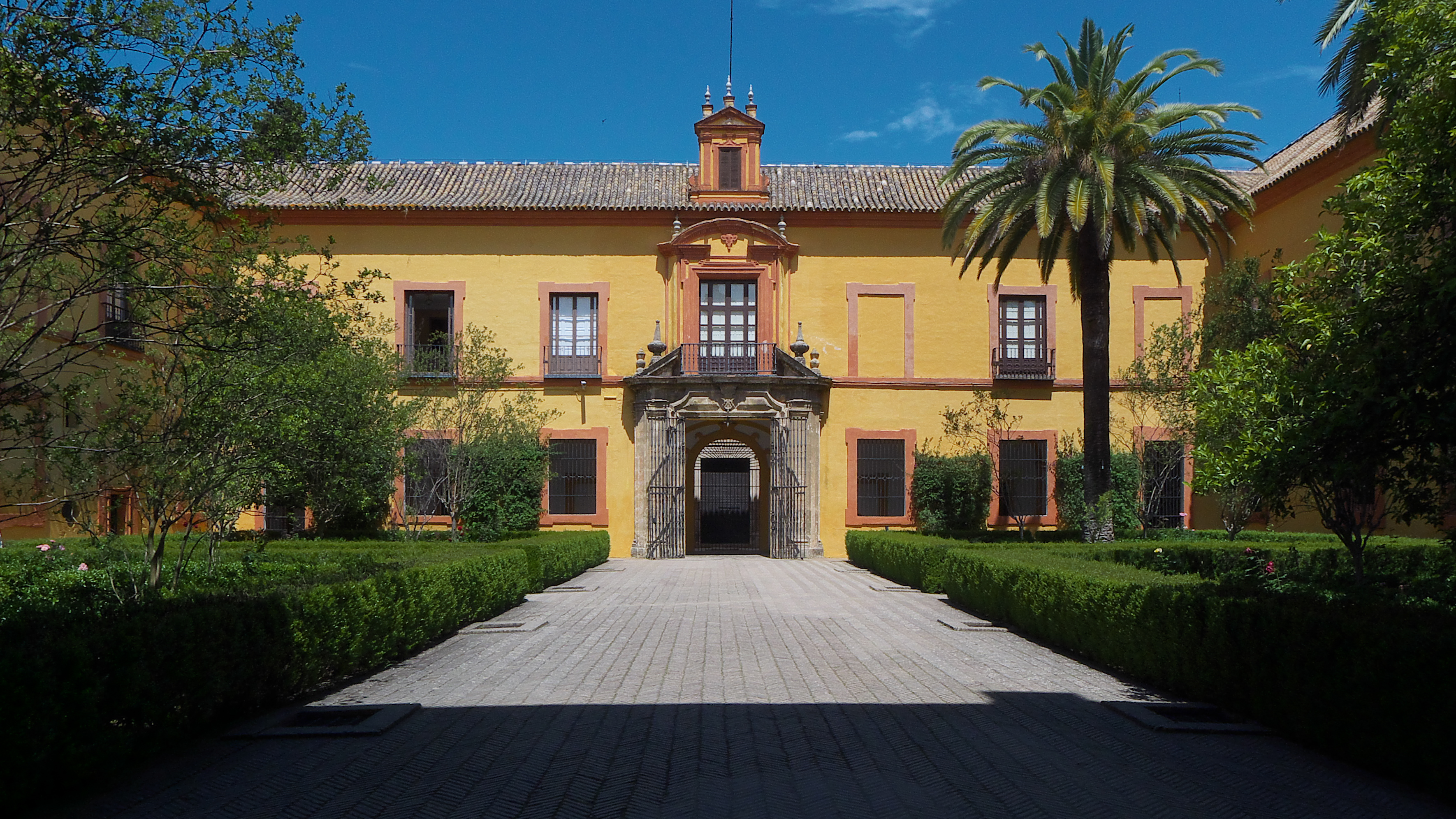 También llamado Patio del Crucero. Ocupa espacio del Palacio de Carlos V o Palacio Gótico.